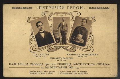 Тома Митов, Михаил Вардев, Стоян Таранджиев.